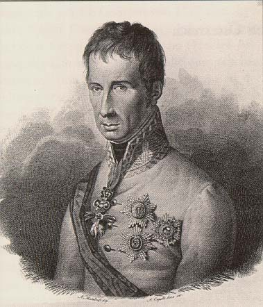 Frans IV van Modena door Domenico Pellizzi (1818 – 1874) - public domain wegens ouderdom.